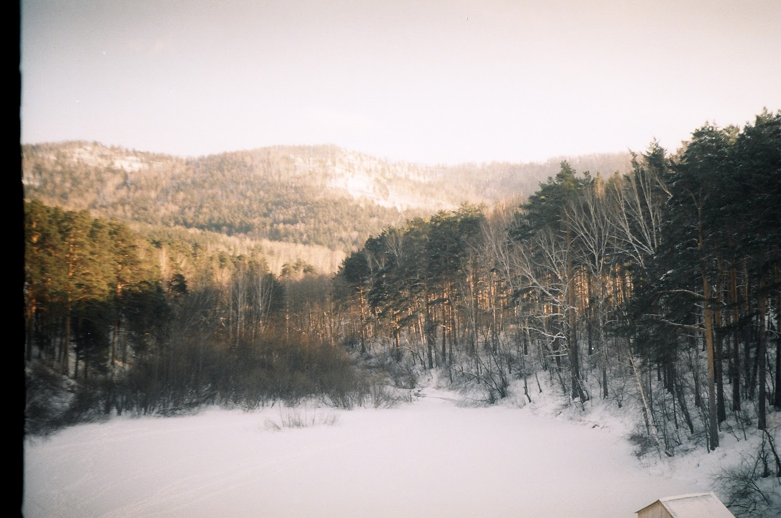 Ильменские горы